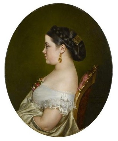 Княжна Ольга Александровна Кантакузена (1843—1929), с 1876 года замужем за князем Лоренцо Альтьери.